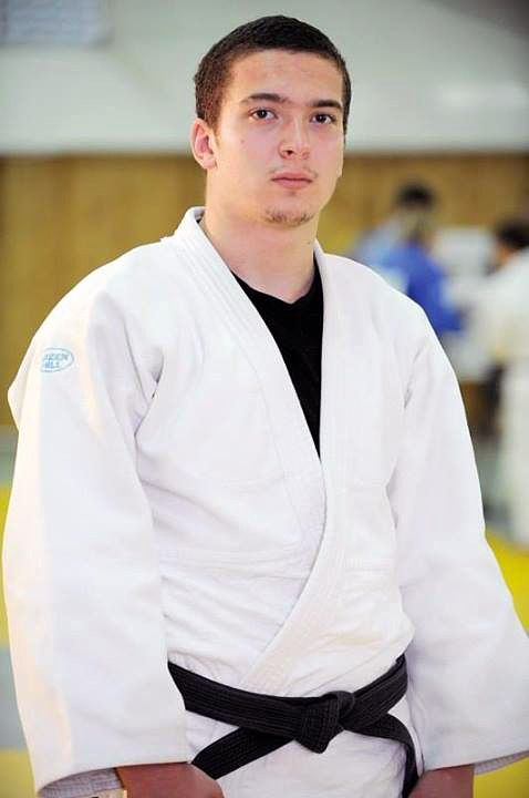 Дмитро Максимов